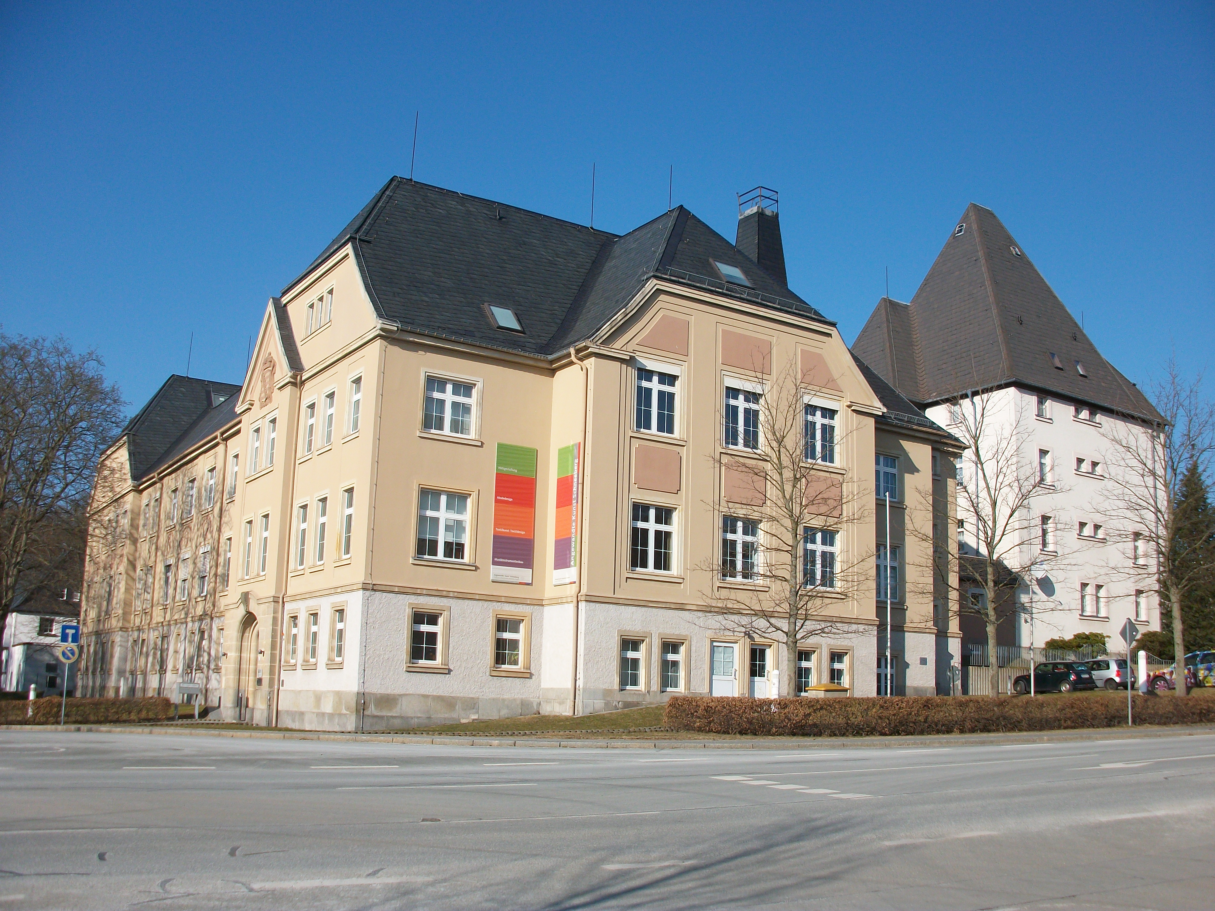 Westsächsische Hochschule, Fachbereich Angewandte Kunst, Schneeberg (ehem. Amtsgericht Schneeberg)